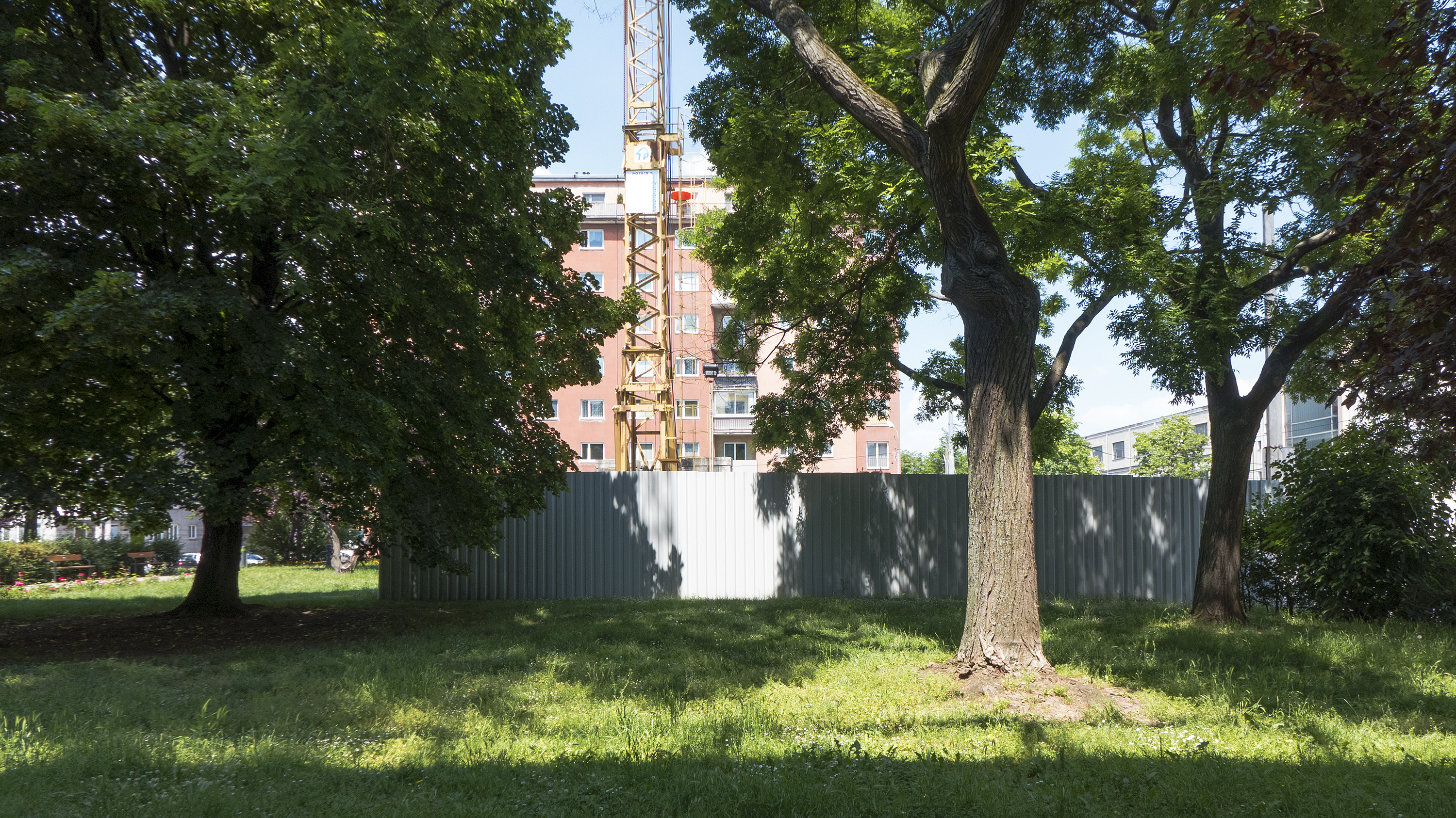 Maria-Rekker-Park in Wien (zum Aufnahmezeitpunkt Baustelle der U1-Süd-Verlängerung)